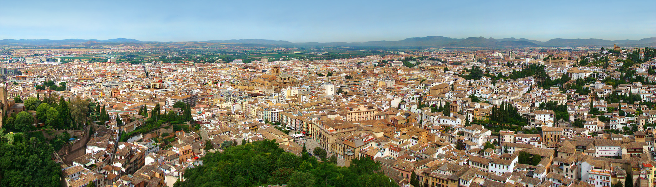 Vista panorámica desde la Torre de la Vela de la Alhambra, Granada, Andalucía, España.